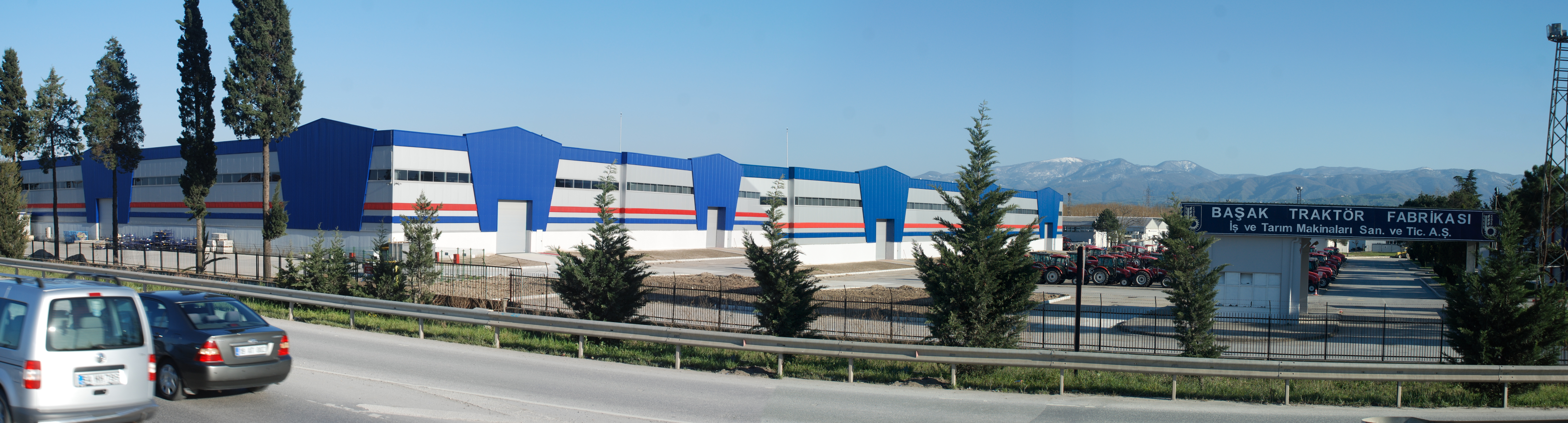 Sakarya Başak Traktör Fabrikası